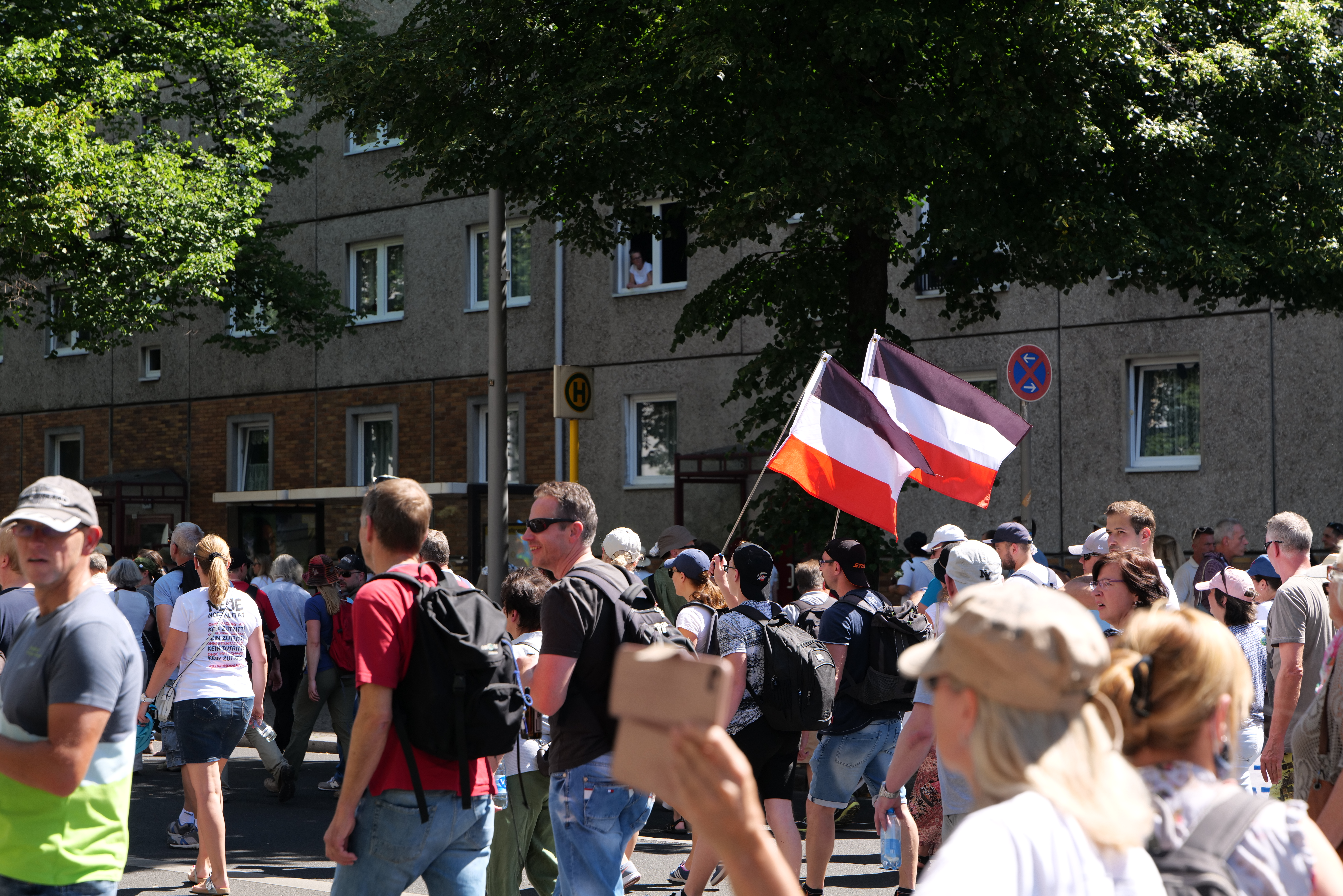 Demonstration von und Verschwörungsgläubigen und Rechtsextremen unter dem Motto „Tag der Freiheit – Das Ende der Pandemie“ gegen die Schutzmaßnahmen gegen das Coronavirus, gegen die bei der Demonstration demonstrativ verstoßen wurde, was zur formalen Auflösung der Demonstration und anschließenden Kundgebung führte am 1. August 2020 in Berlin.